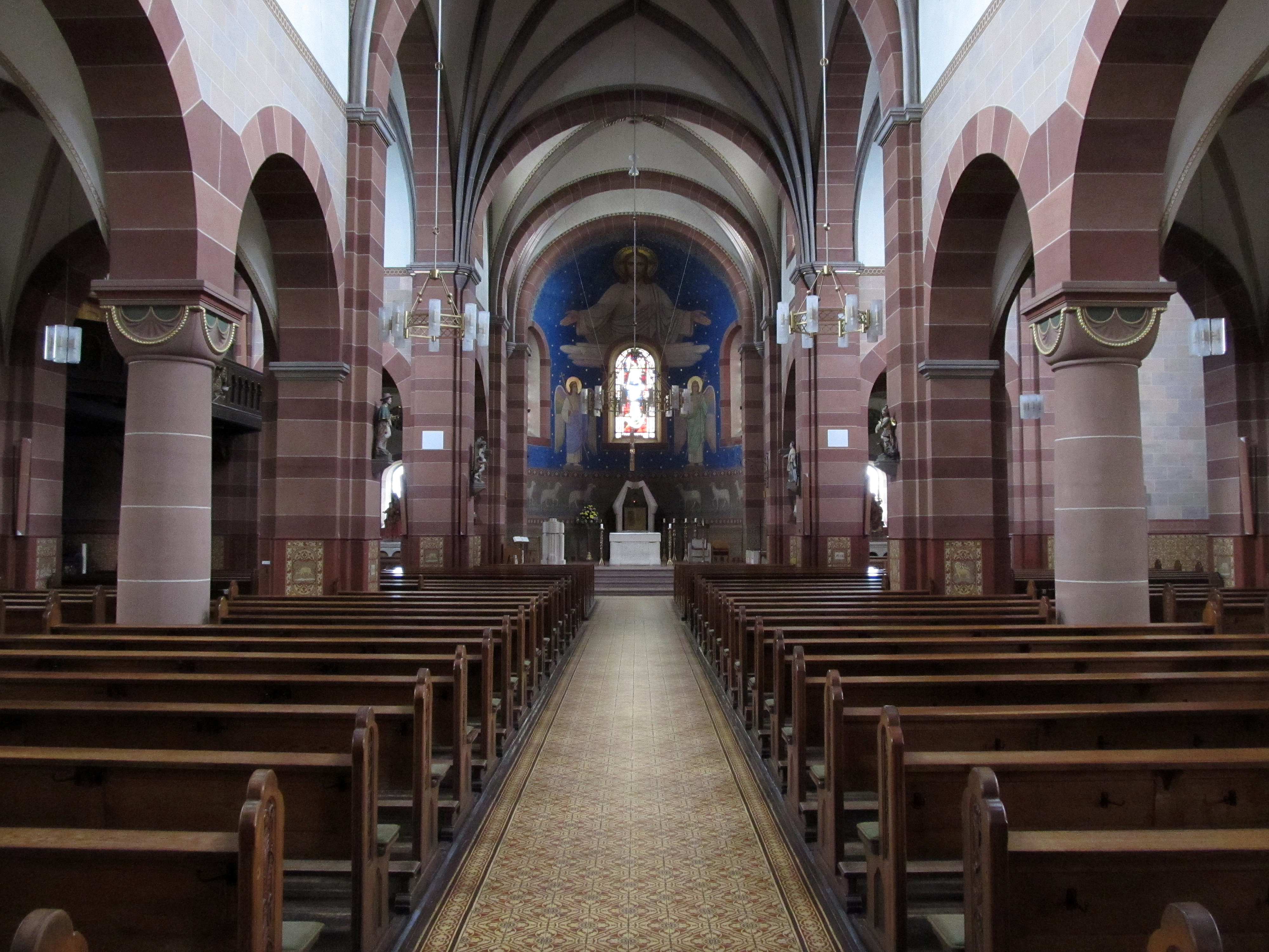 Blick ins Innere der katholischen Pfarrkirche St. Remigius in Bliesen, einem Stadtteil von St. Wendel, Saarland